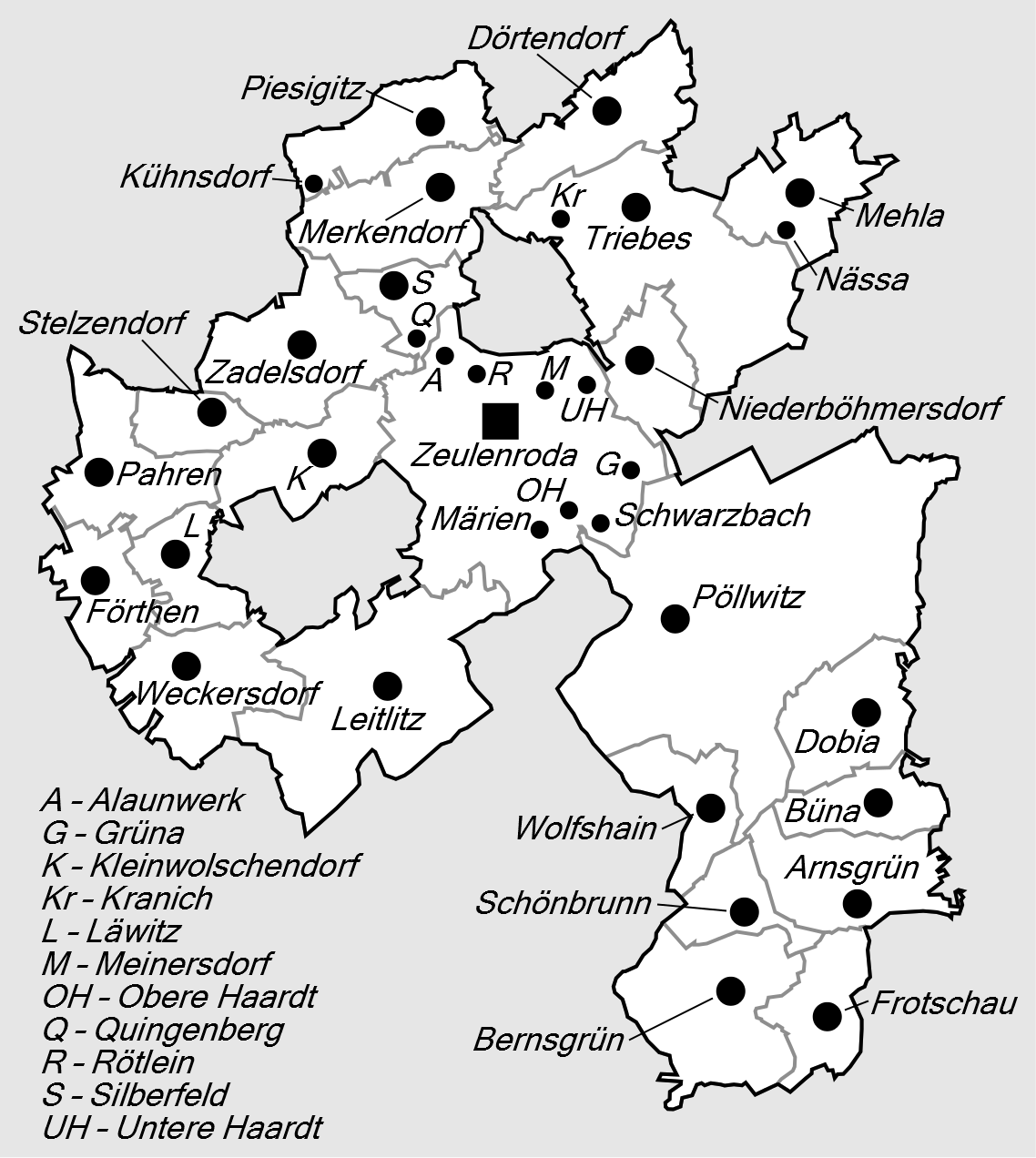 Gliederung der Stadt Zeulenroda-Triebes